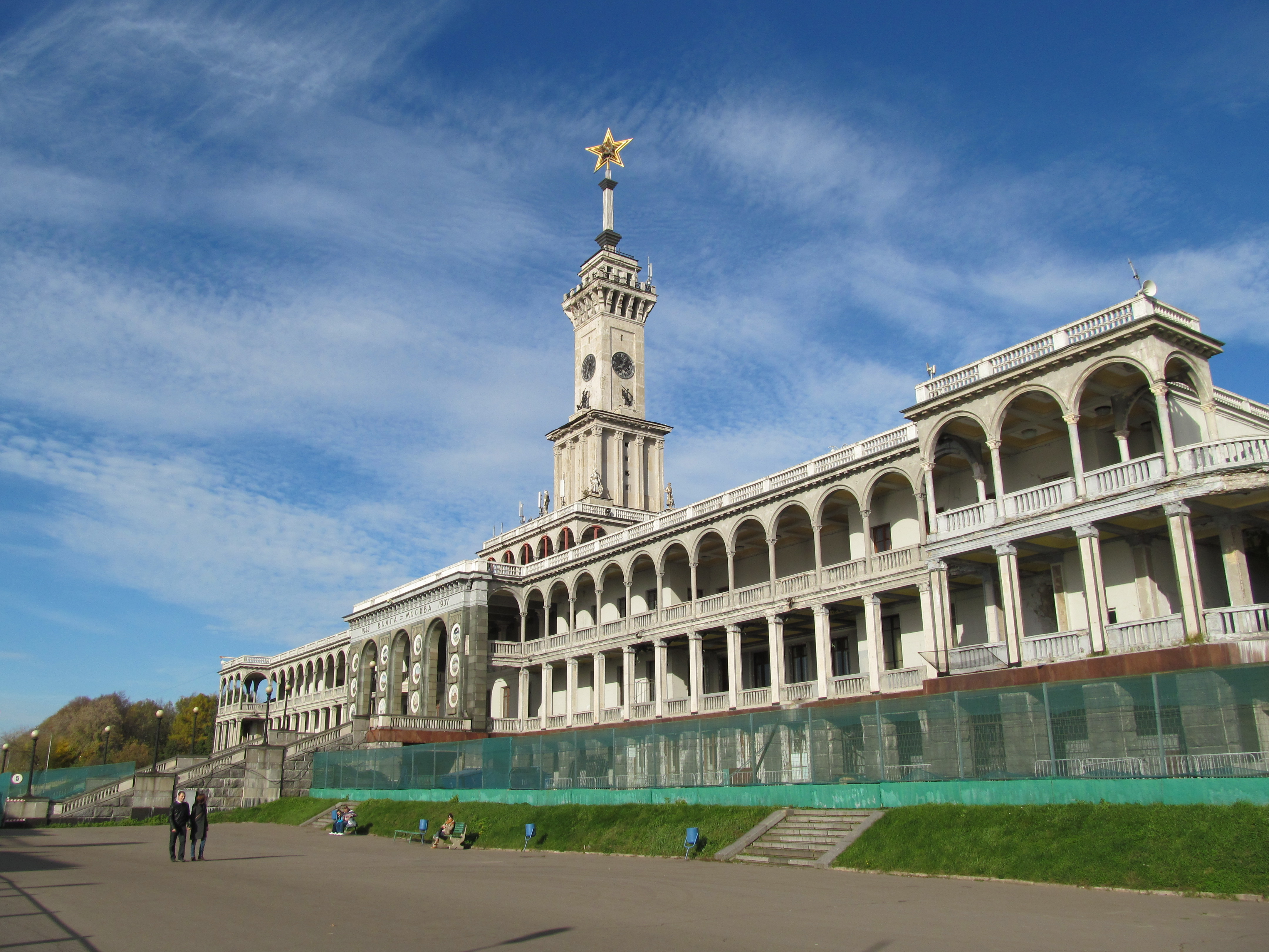 Северный речной вокзал Москвы